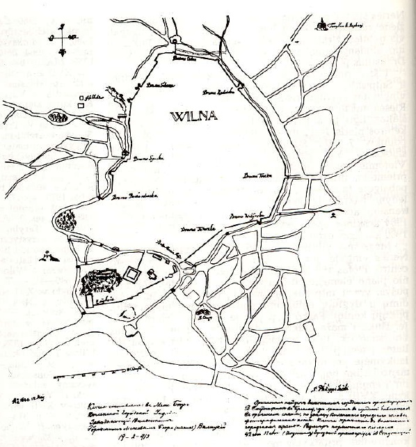 Vilniaus gynybinės sienos planas 1648 m.